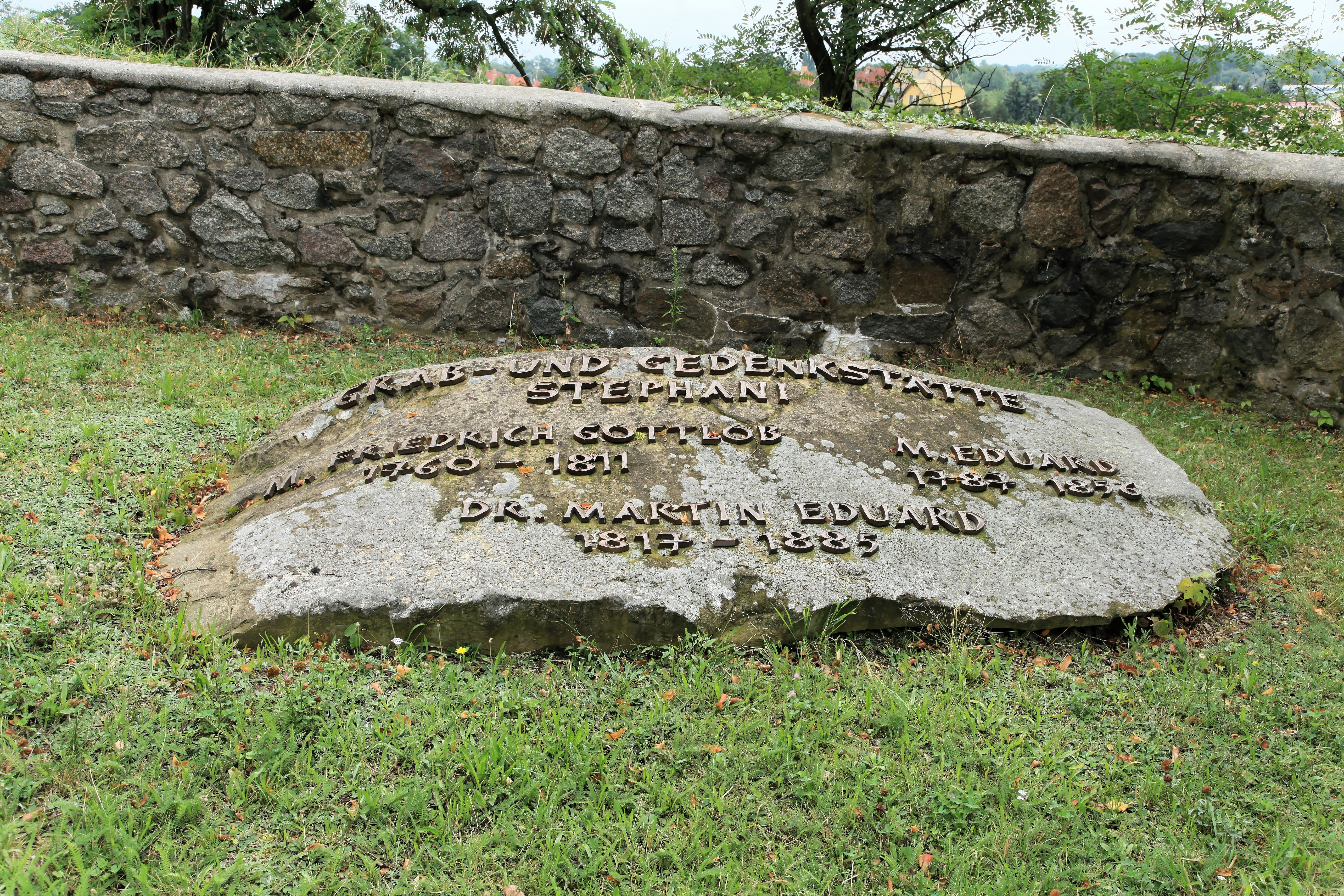 Friedhof Beucha, Kirchberg in Beucha, Brandis